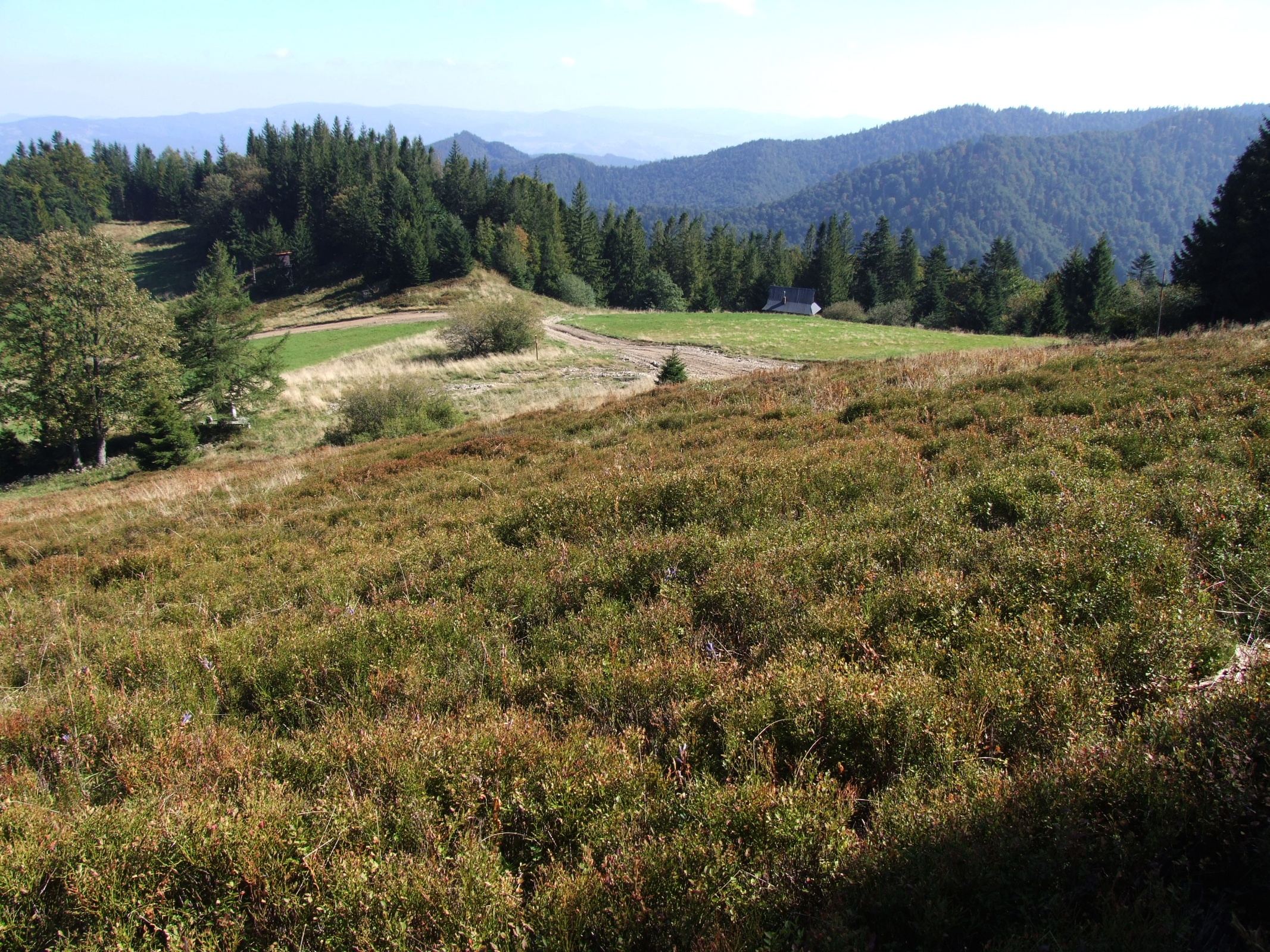 Hala Konieczna w Paśmie Radziejowej (Beskid Sądecki)